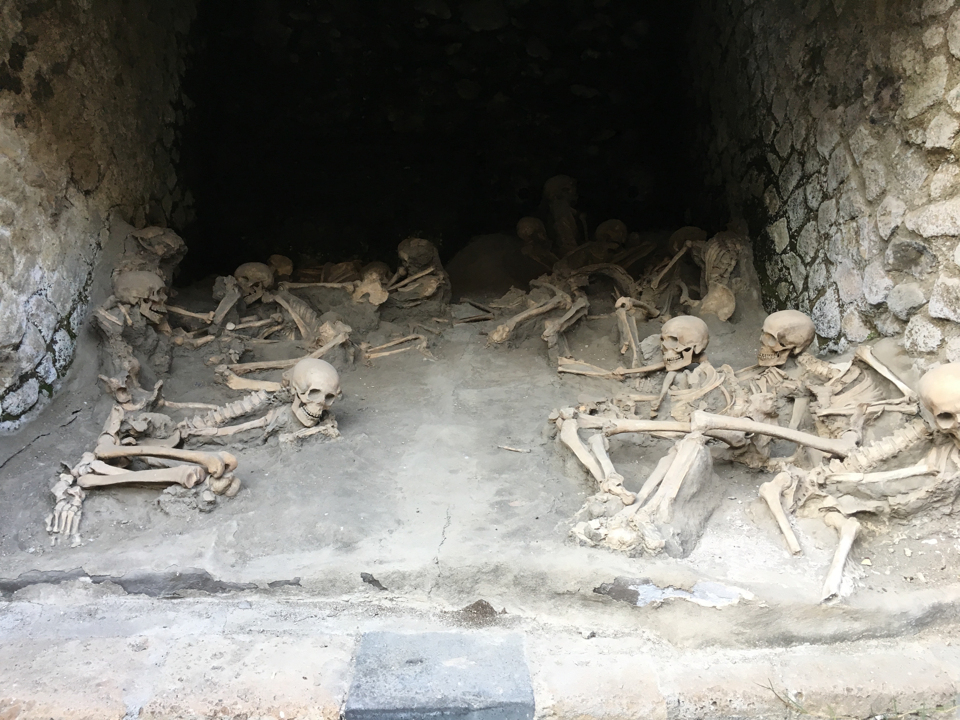 Herculano. Fornici con restos humanos.